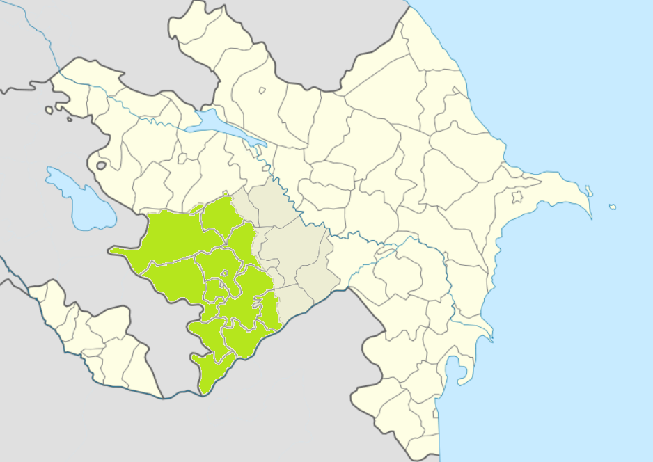 Горный Карабах